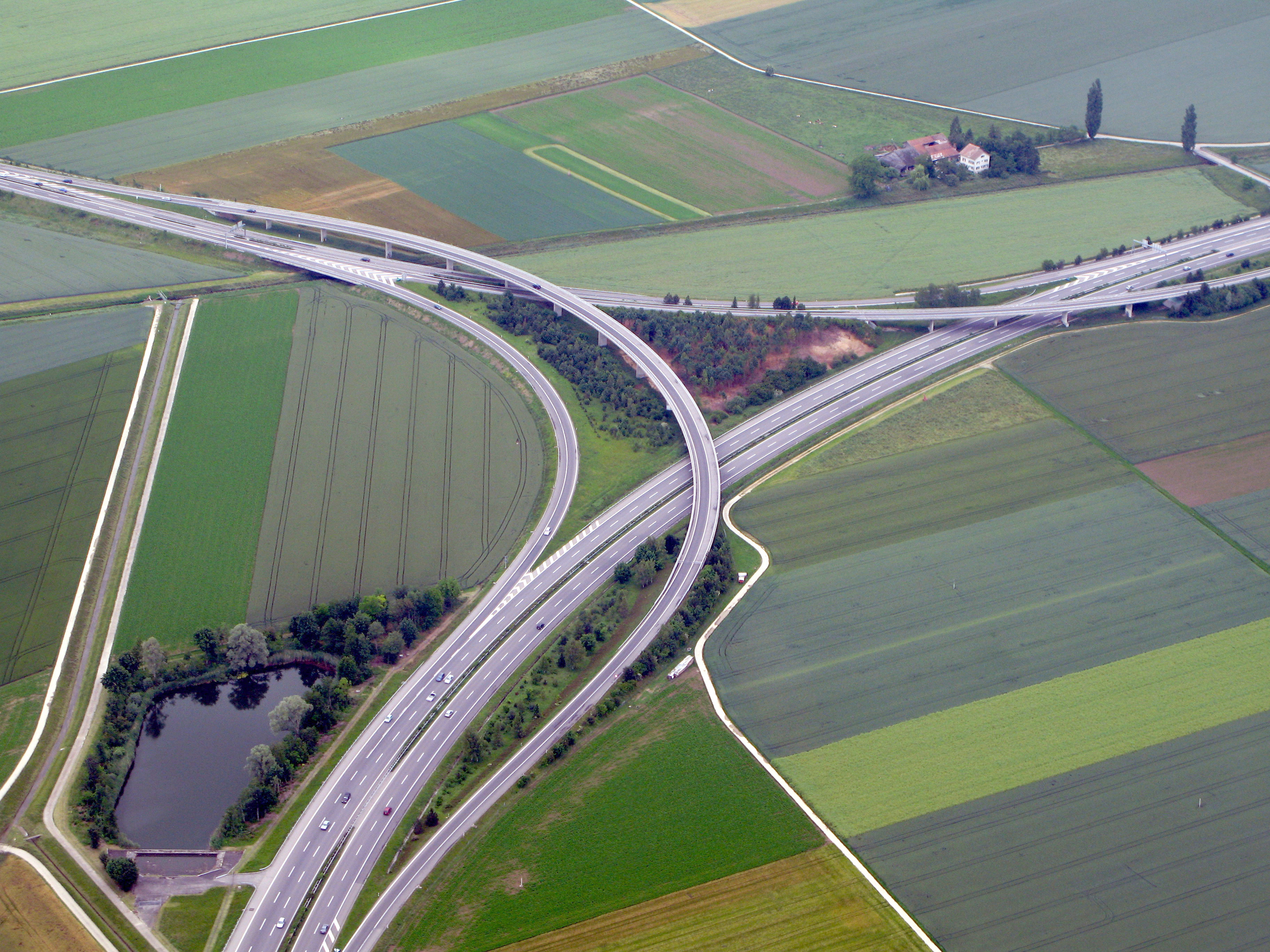 Interchange near Lausanne